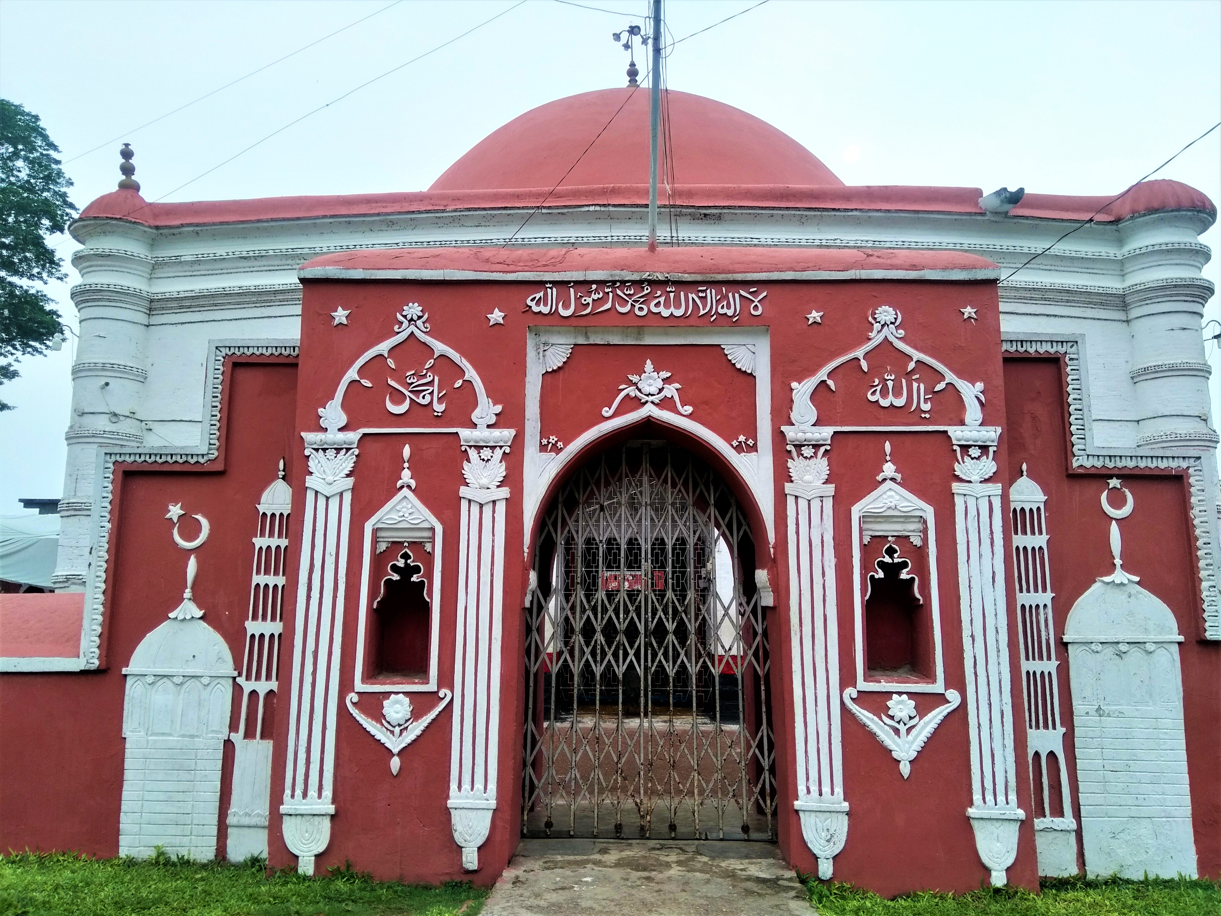 খান জাহানের সমাধি